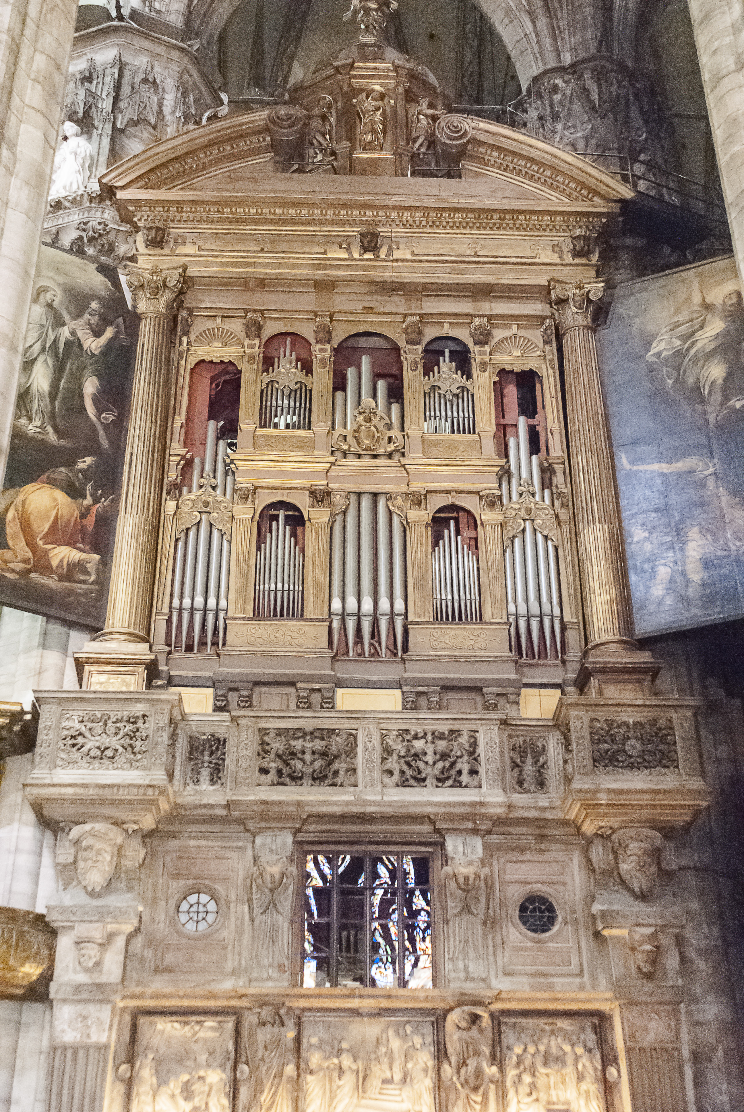 Wnętrze Katedry Duomo (Mediolan - Włochy)